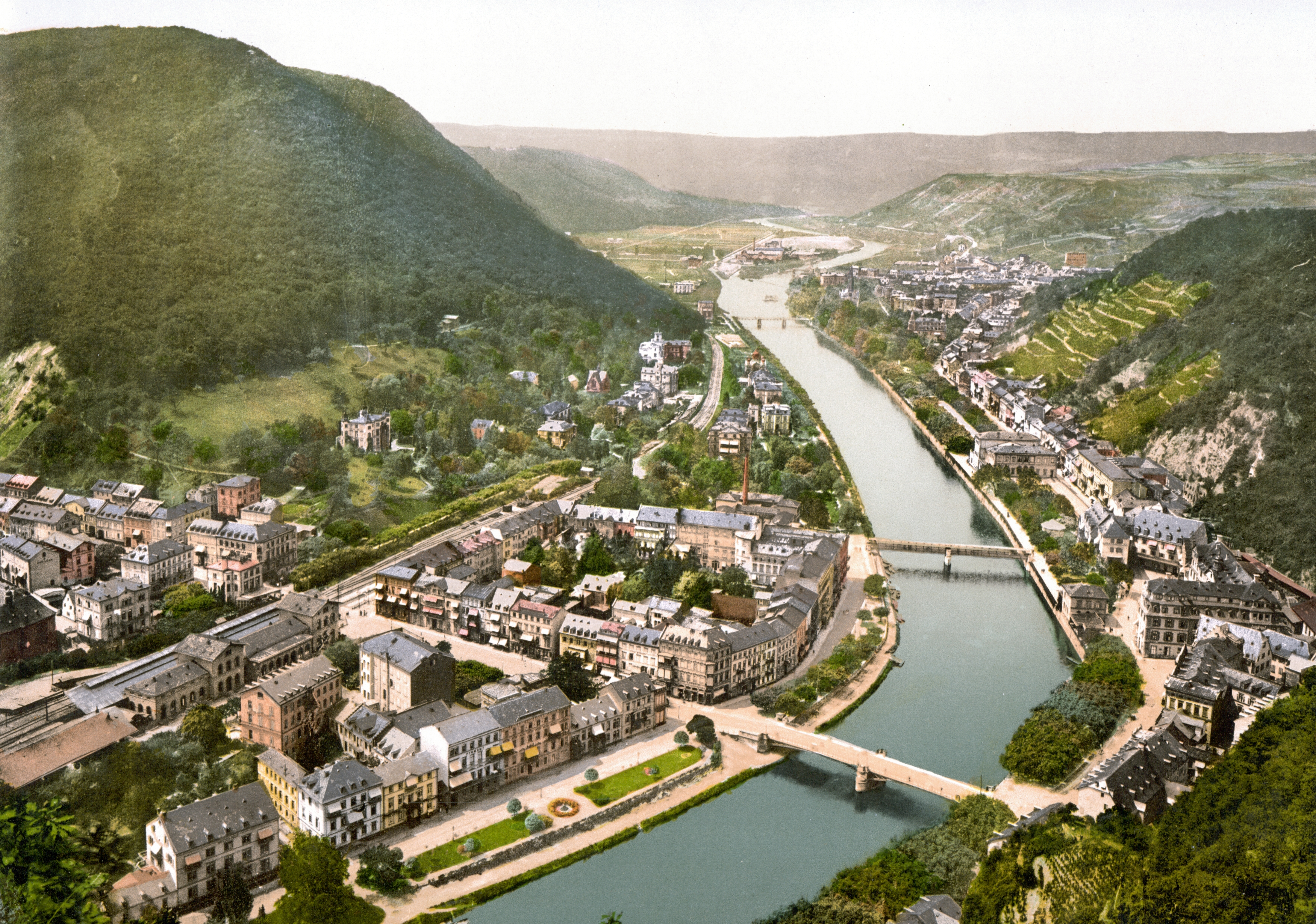 Bad Ems, Lahn